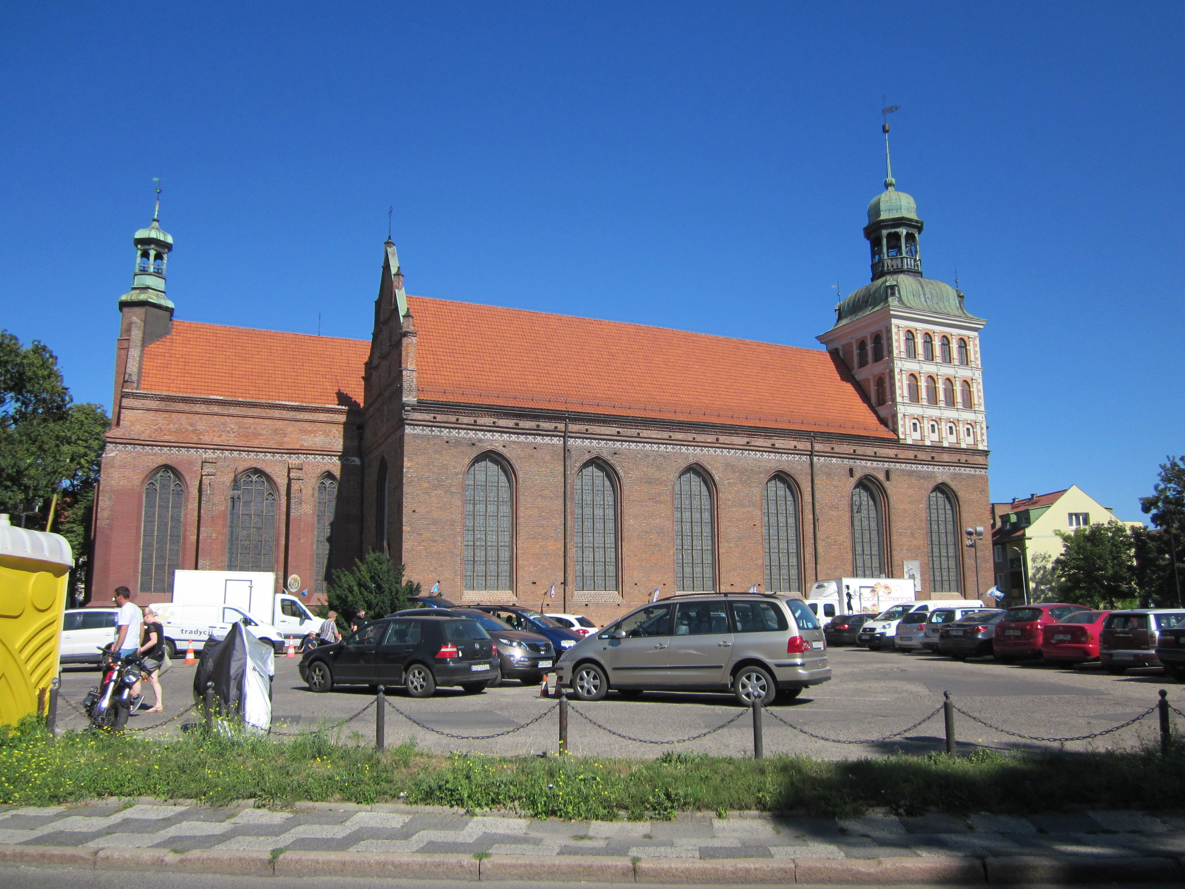 Gdańsk Stare Miasto, ul. Brygidki / Profesorska 17 - kościół klasztorny brygidek, obecnie, rzymskokatolicki parafialny p.w. św. Brygidy (Bazylika mniejsza), XIV/XV, XVII, po 1958